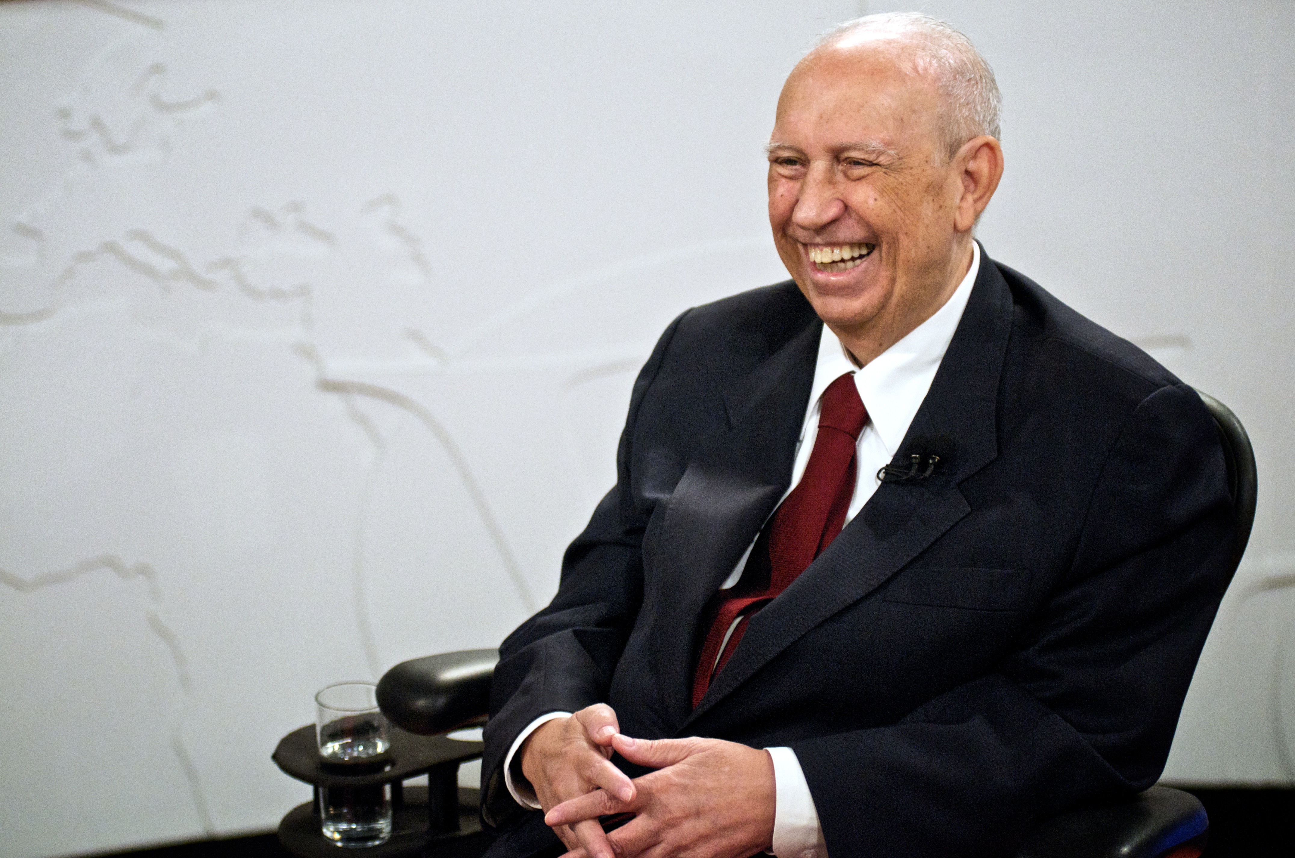 Foto: Silvio Tanaka